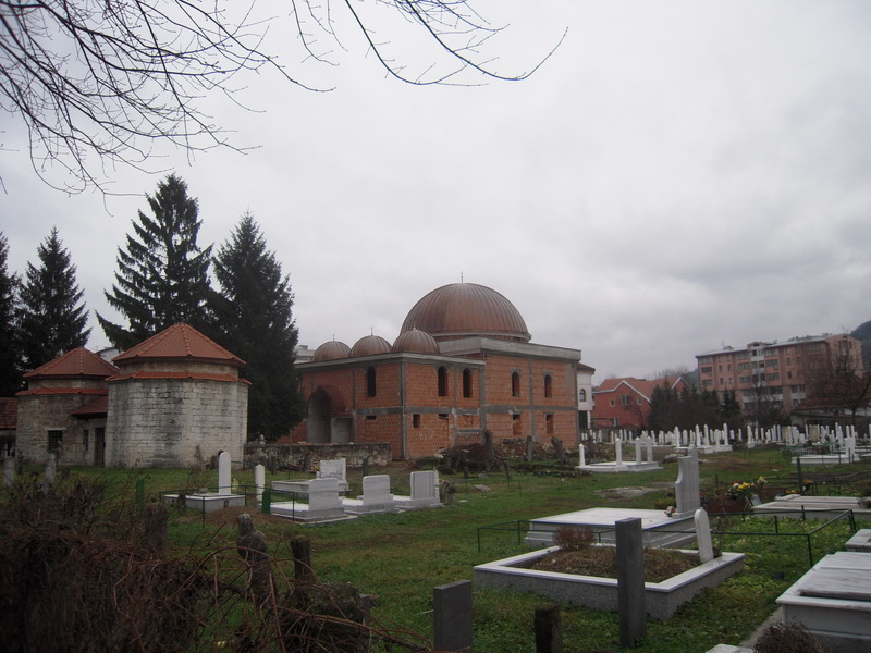 Gazanferija